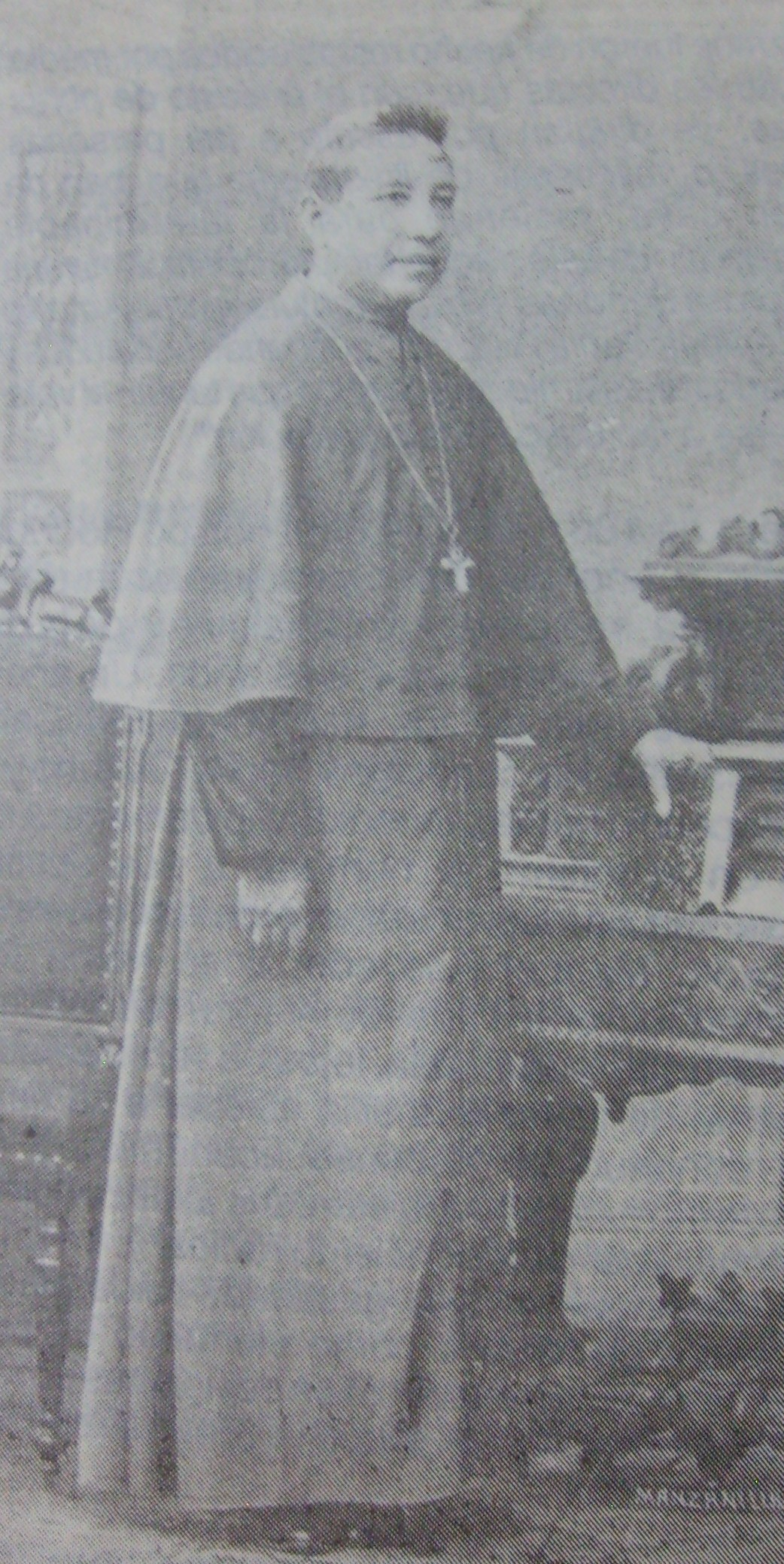 Crescencio Carrillo y Ancona, historiador y obispo de Yucatán